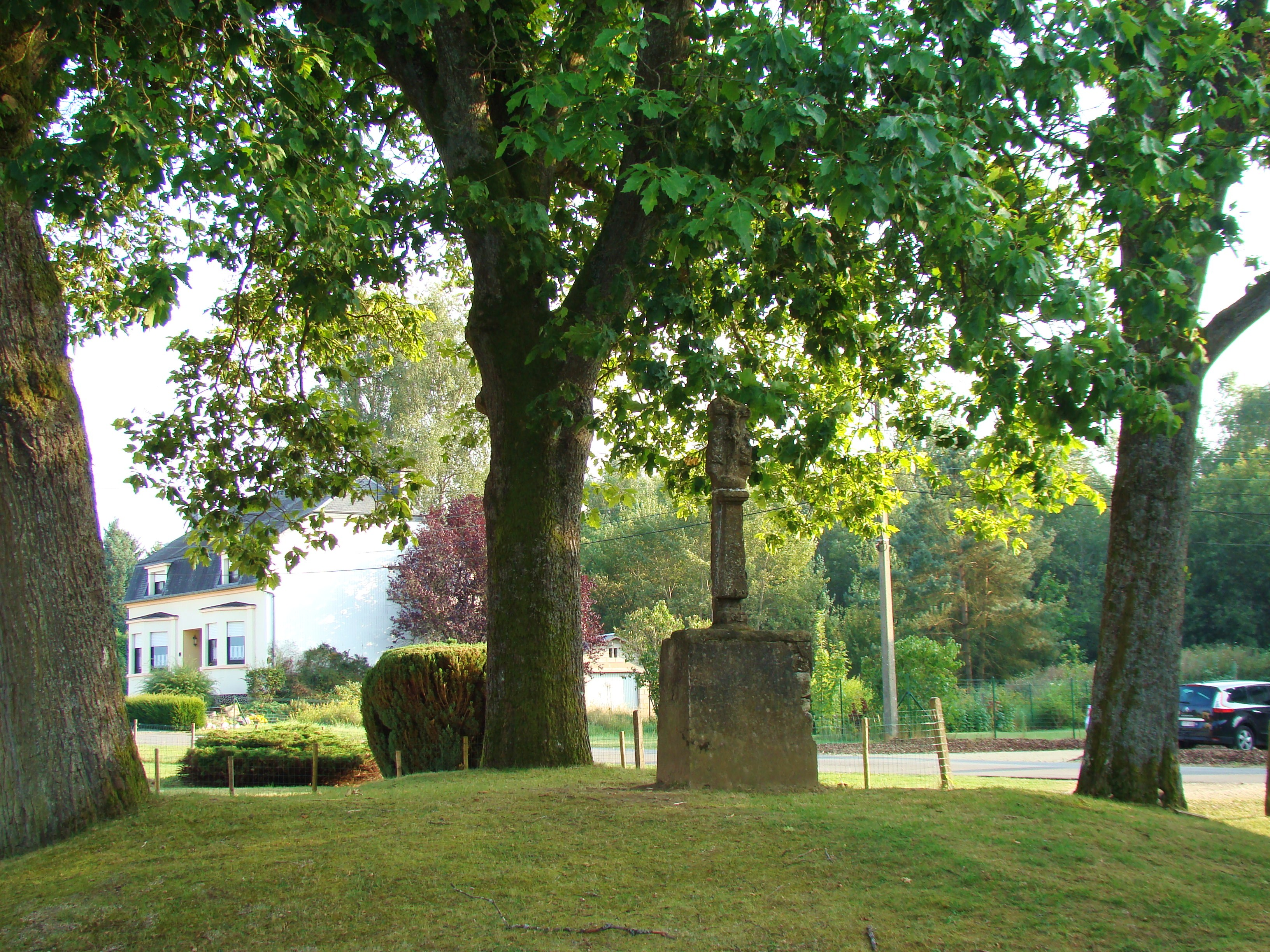 Trois chênes plantés en 1930 pour le 100ème anniversaire de la Belgique. Ce sont des chênes d'Amérique.Ces arbres entourent un calvaire. Ce calvaire est un dernier témoin de l'ancien cimetière de Fouches, le cimetière de la" peste" Le site est situé à côté d'une chaussée romaine. Le samedi 27 juillet 2013 un orage a arraché l'arbre de droite et a mis à jour un reste de métal qui pourrait provenir de la bombe ou de l'avion américain qui a explosé au-dessus du village.Il s'est avéré que l'arbre était rongé par des champignons et que son tronc était spongieux.Pourra-t-on sauver les deux autres?